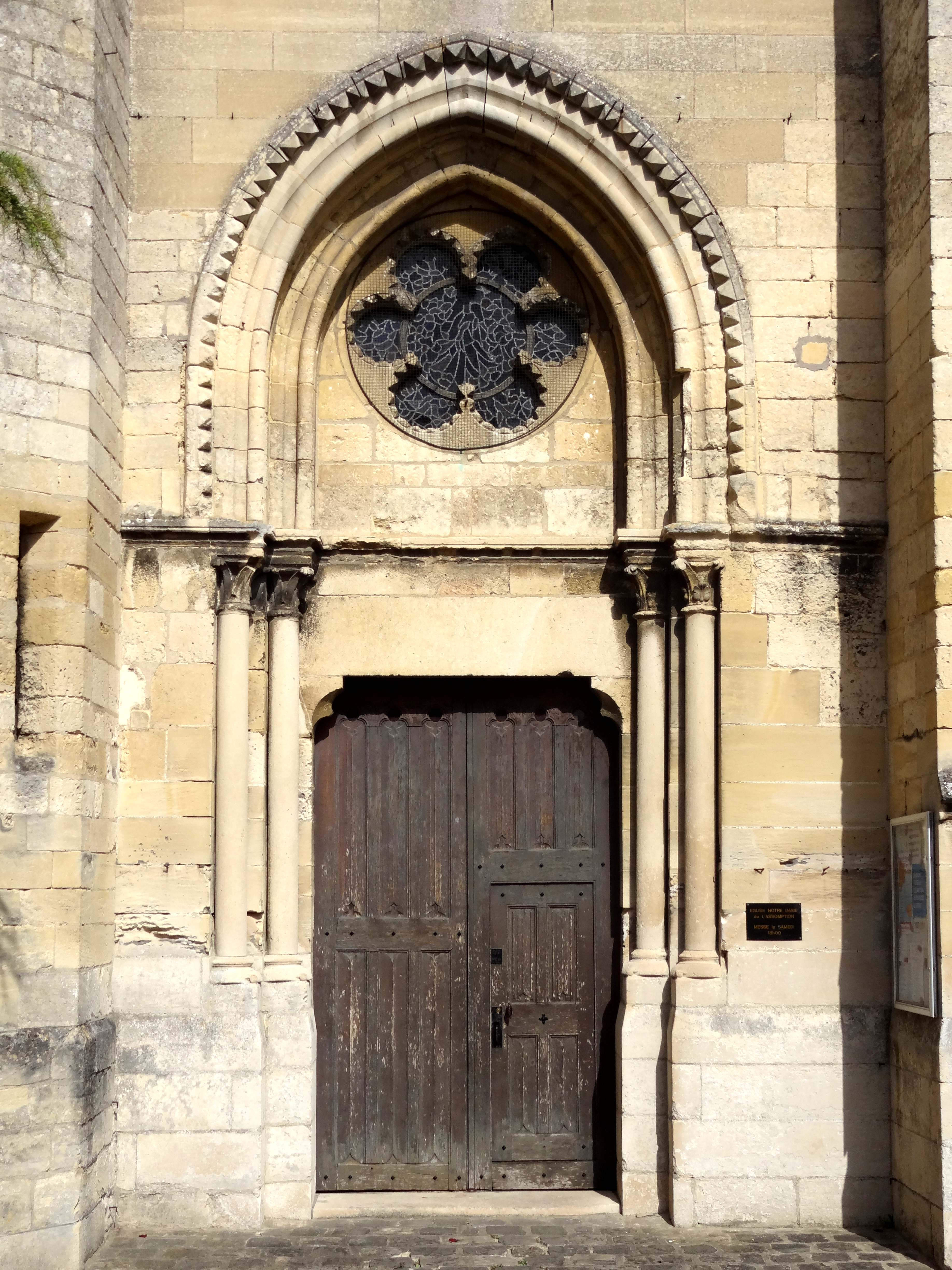 Église Notre-Dame de Champagne-sur-Oise - voir titre.